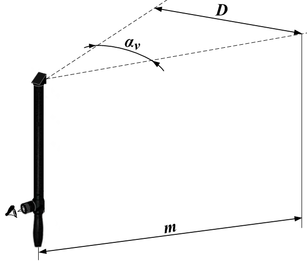 A periszkóptól m távolságra fekvő céltárgy két széle közötti D terület ábrázolása